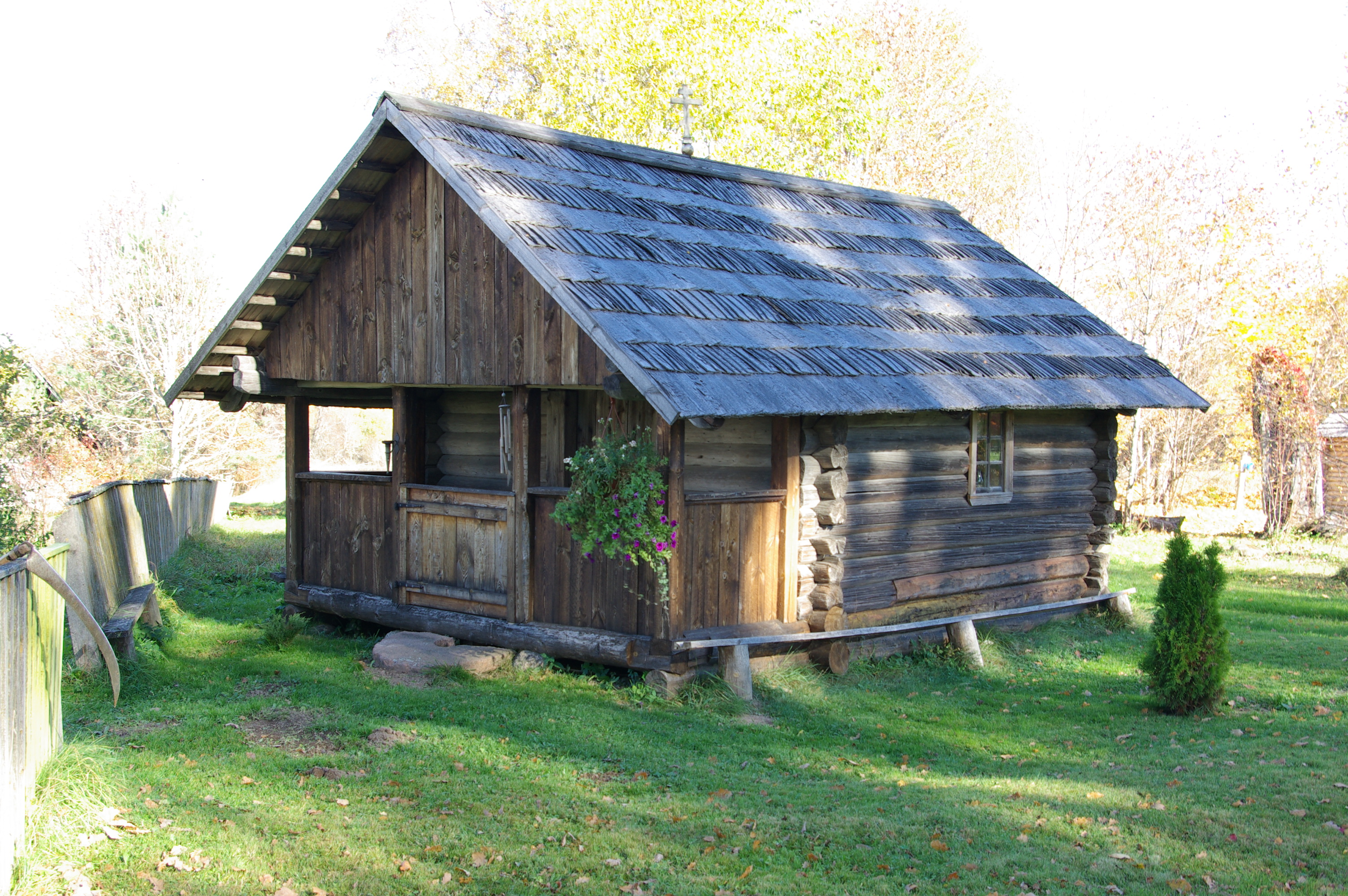 Serga tsässon